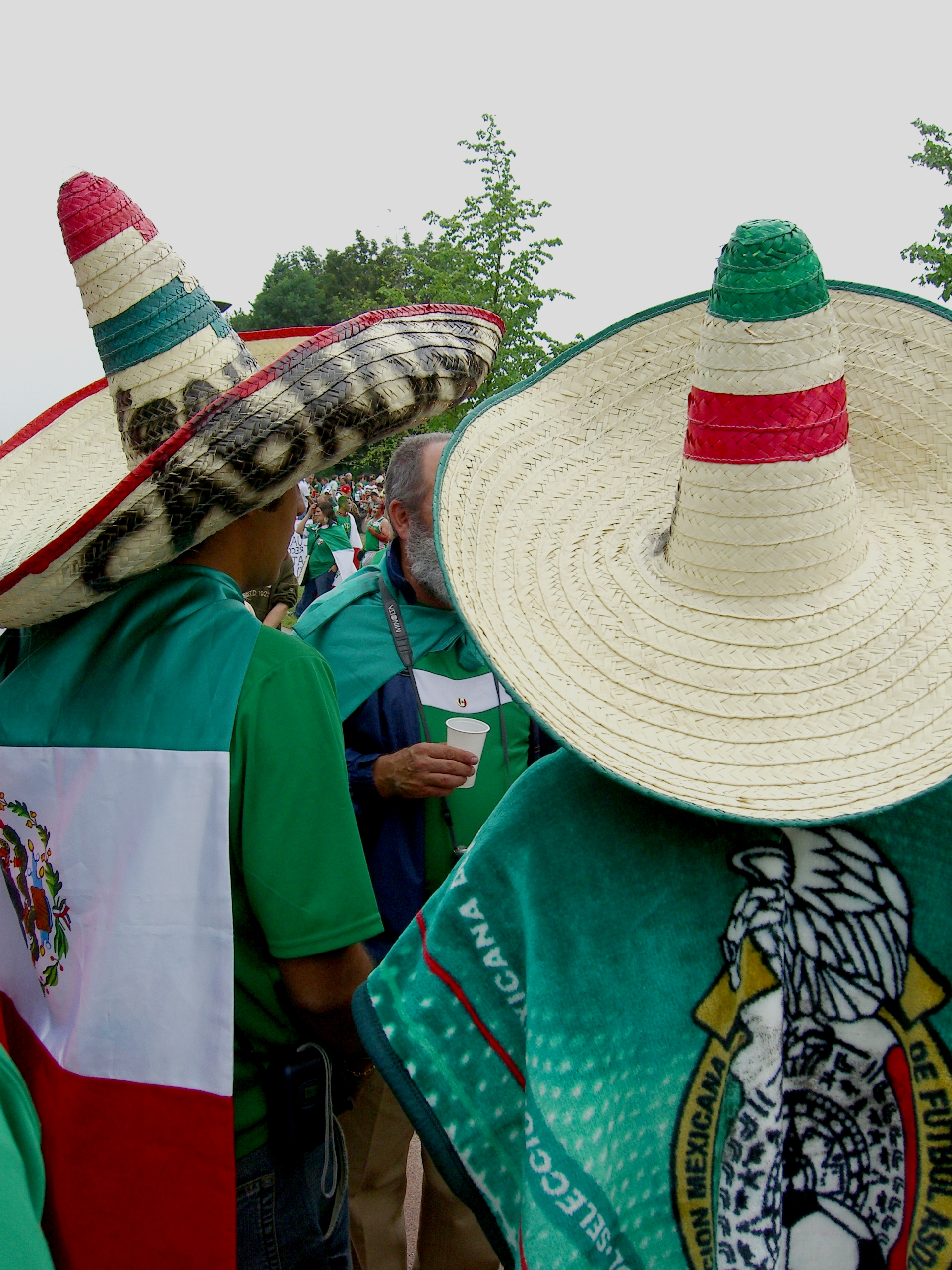 Mexicanos Gelsenkirchen